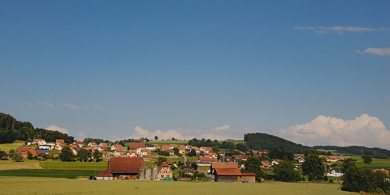 Le village de Montet dans le district de la Glâne, canton de Fribourg, Suisse.